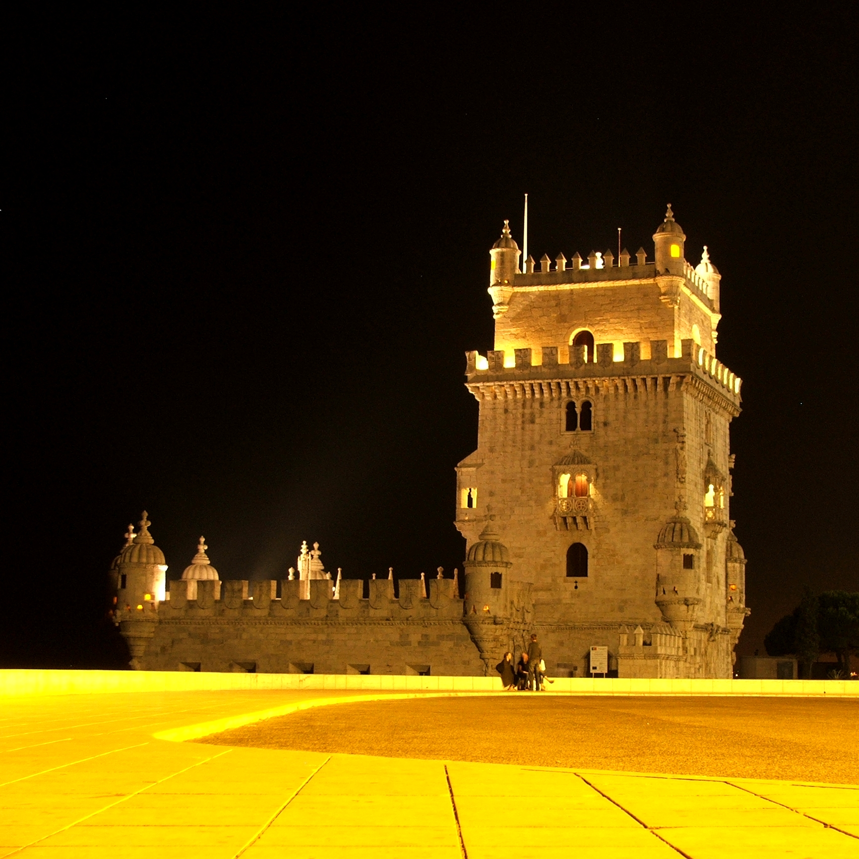 Torre de Belém lit up at night.